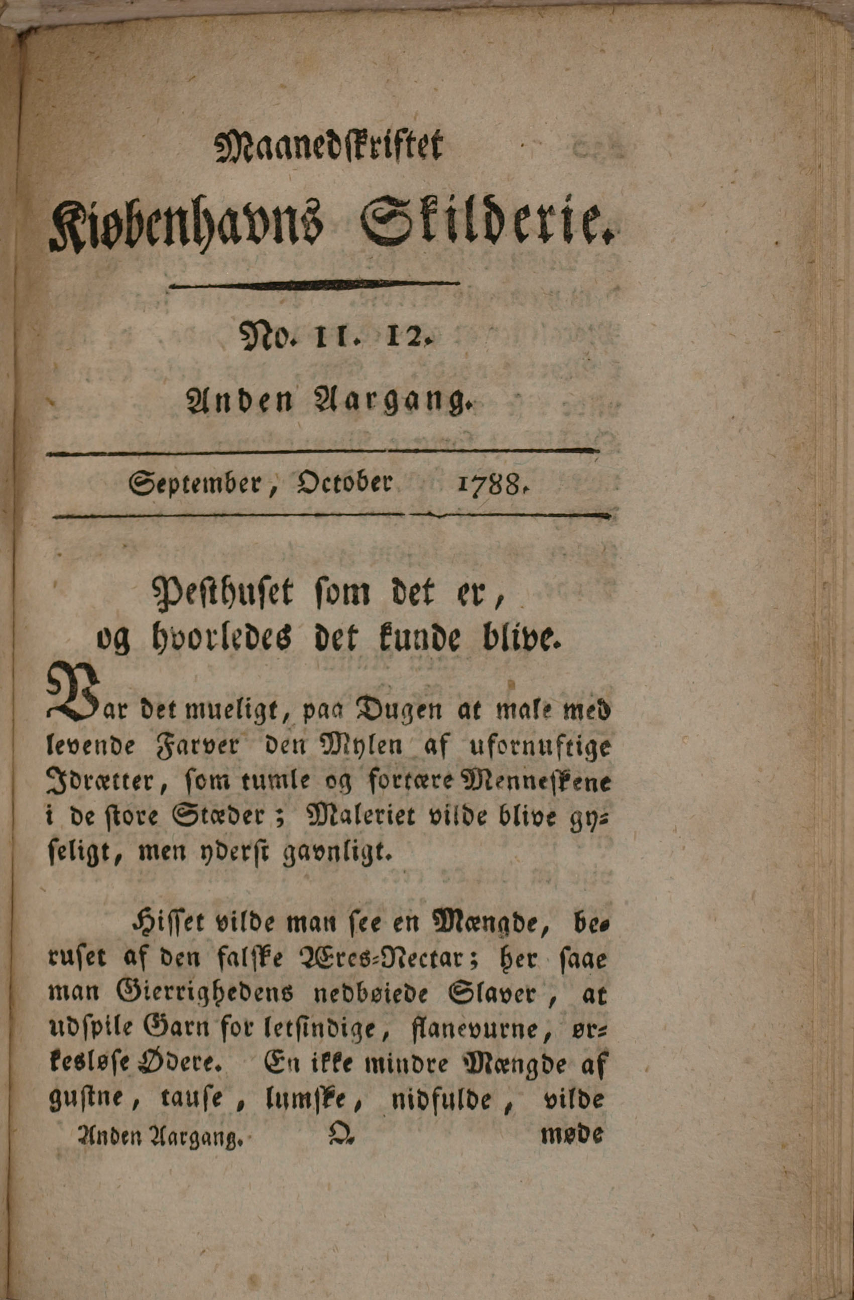 Titelbladet til Niels Ditlev Riegels' månedsskrift Kiøbenhavns Skilderie, nr. 11 & 12 1788, hvor han skriver om de utålelige forhold i Pesthuset i København.